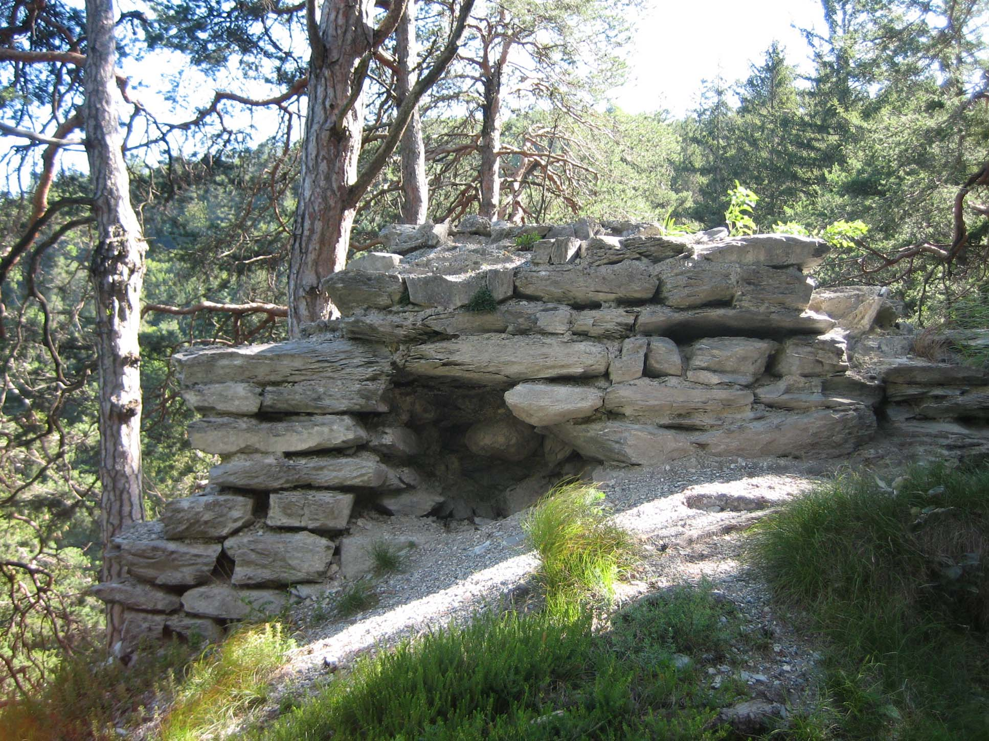 Schildmauer von N